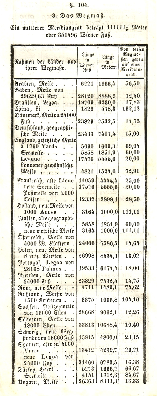 Alte Maßeinheiten / Alte Maßeinheiten / Wegmaße